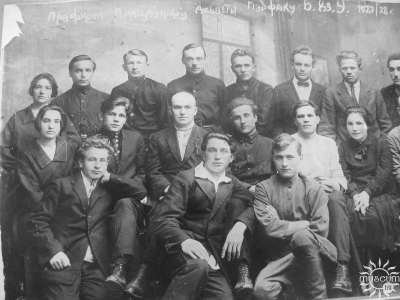 Прафкамітэт працаўнікоў асветы педфакультэта БДУ. У верхнім радзе 4-ты злева — І. П. Дэйніс. 1928